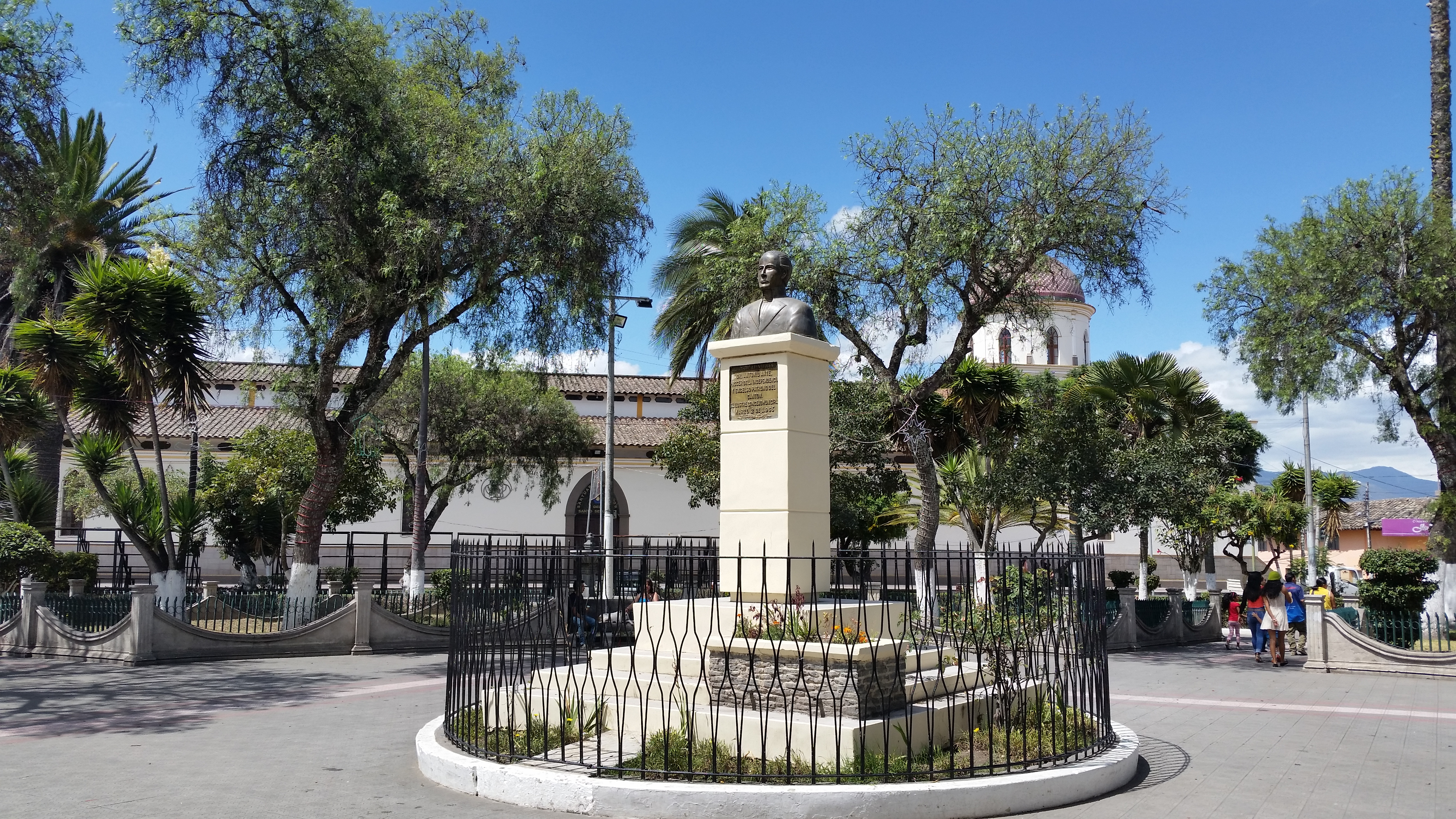 Monumento a Antonio Ante en el Parque Central "Antonio José de Sucre", Atuntaqui (Provincia de Imbabura)